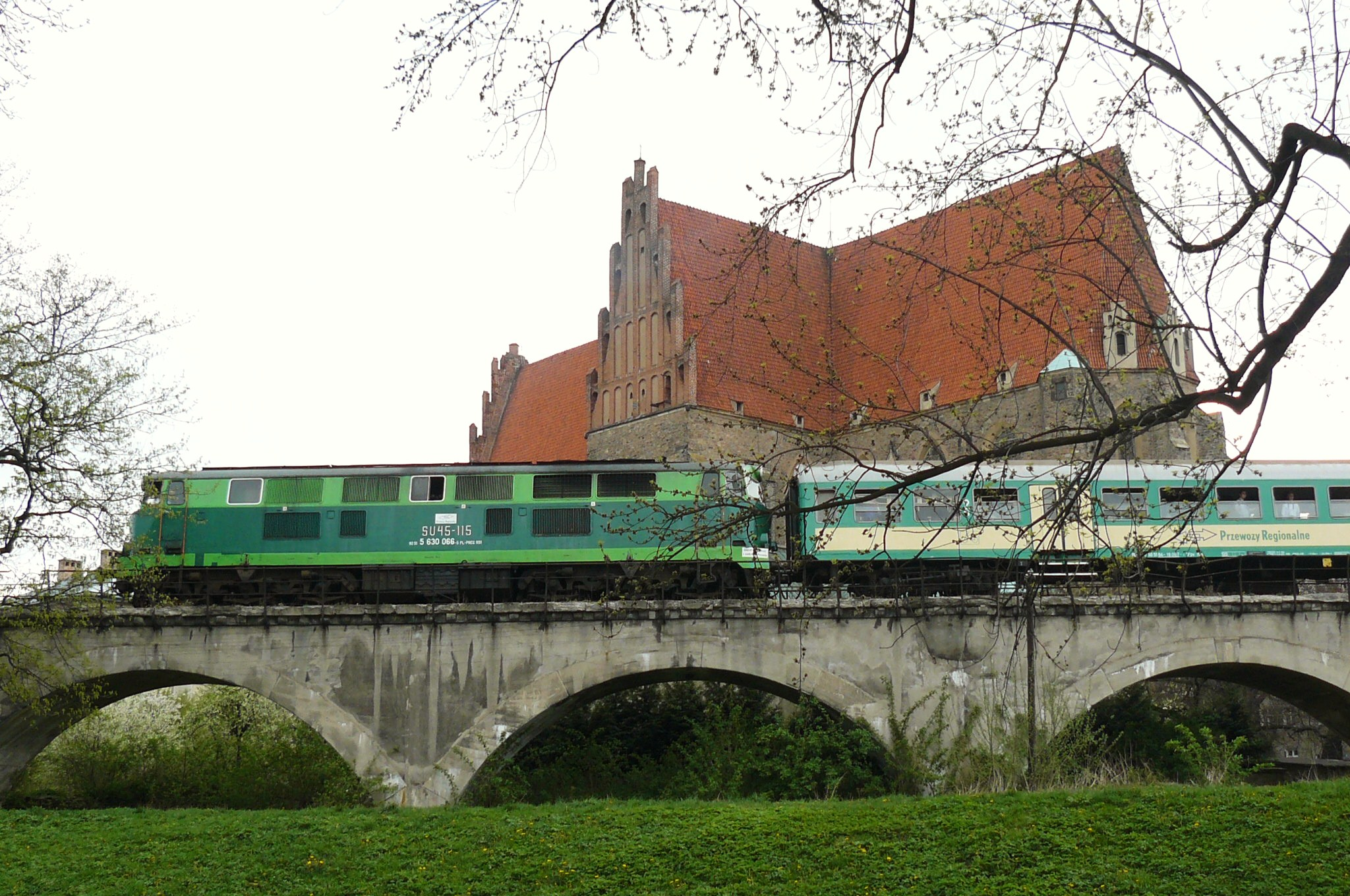 SU45-115 z pociągiem specjalnym "Dolnośląskie Zakamarki" (25.4.2015r.). Estakada pomiędzy Strzegomiem Miastem, a Grabiną Śląską.